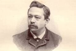 Portrait de Hubert Louis Noël dit Louis Noël (Statuaire)